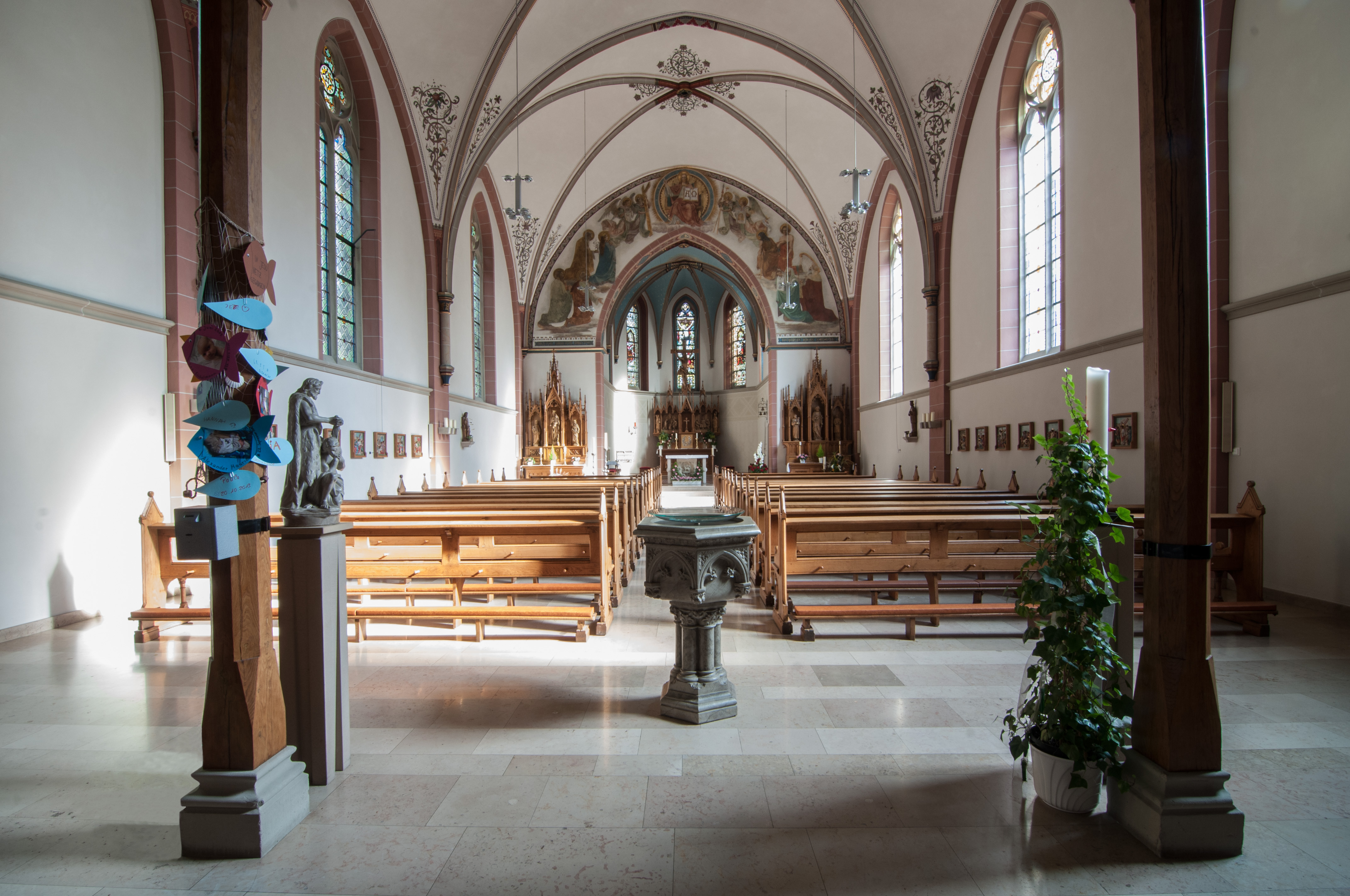 Endorf, St. Sebastian; Innenaufnahme: Totale